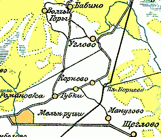 Фрагмент карты окрестностей Ленинграда 1928 г., включающий деревню Бабино.